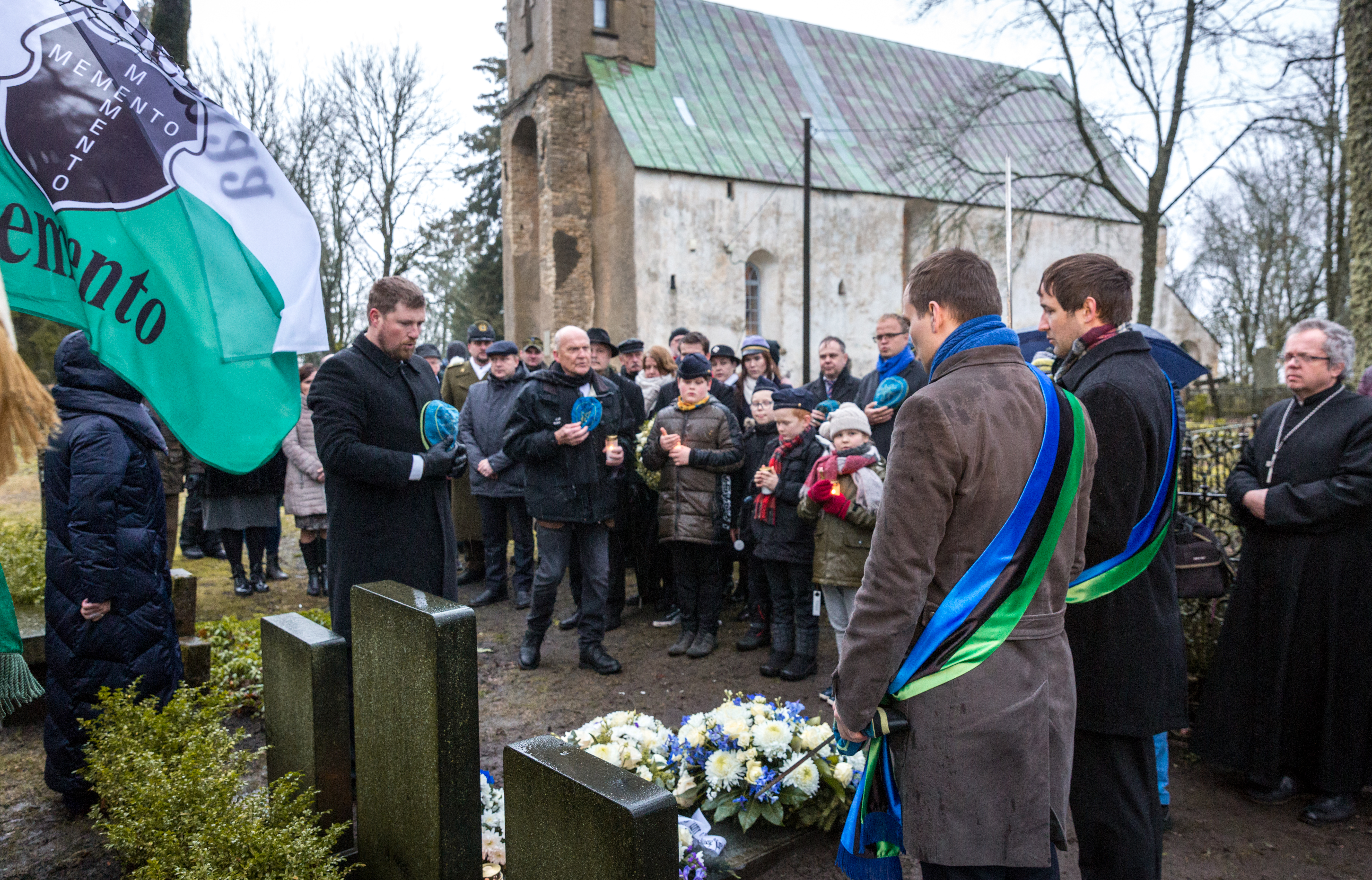 Jüri Uluotsa mälestuspäev Kirblas